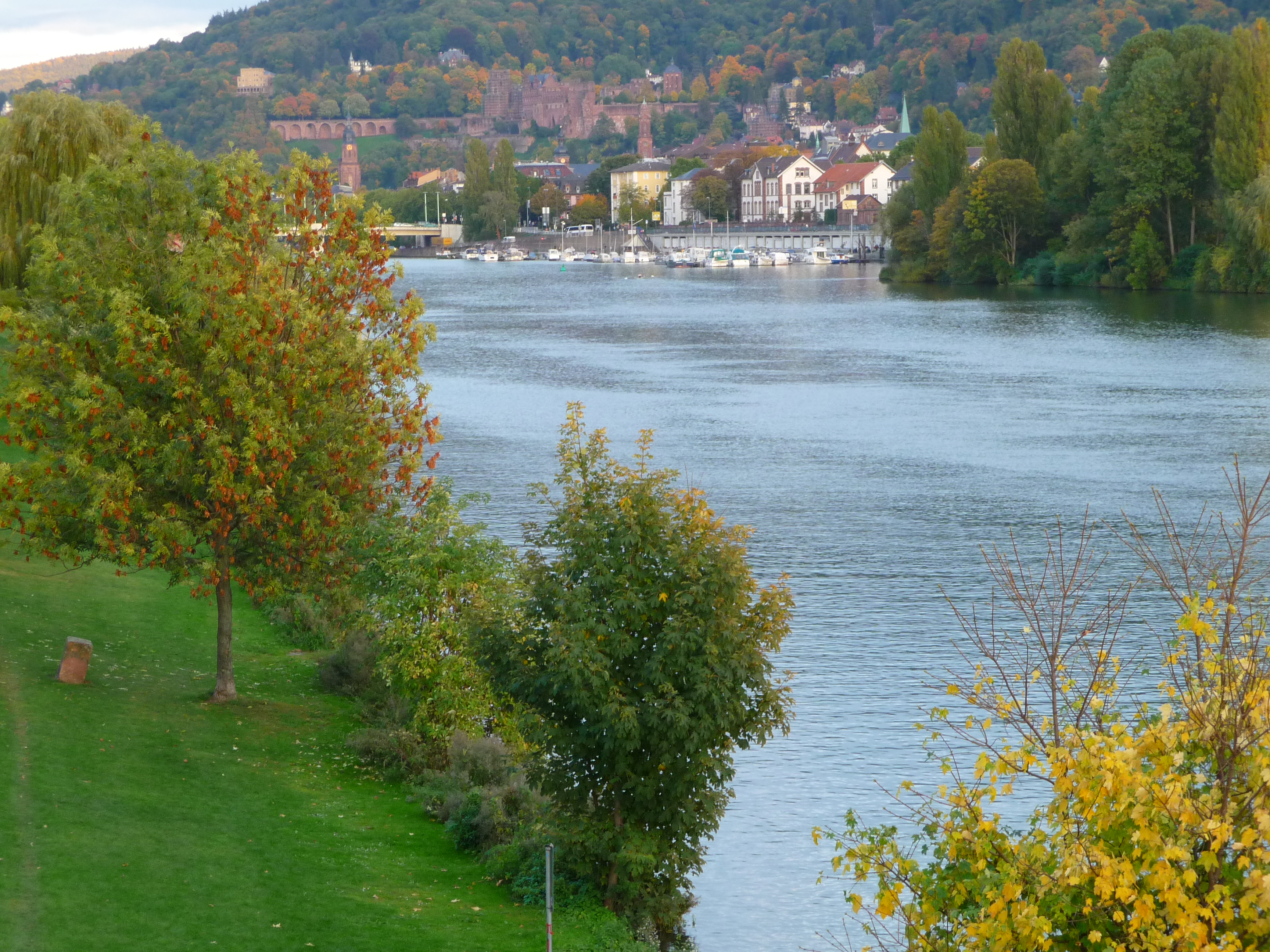 Blick von der Ernst-Walz-Brücke auf Heidelberg (Neckar, Altstadt, Schloss)